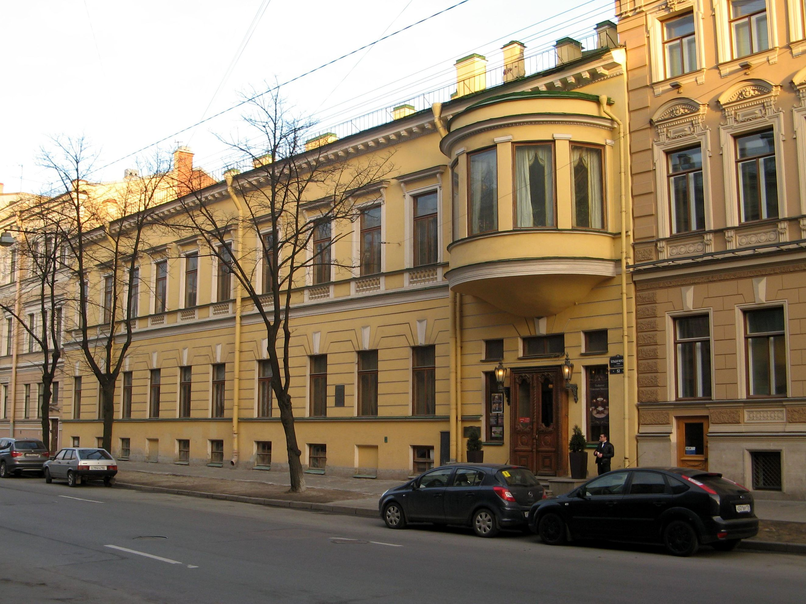 Дом Половцова А. А. с дворовыми флигелями (Санкт-Петербург и Лен.область, Санкт-Петербург, Большая Морская улица, 52, р. Мойки наб., 97)